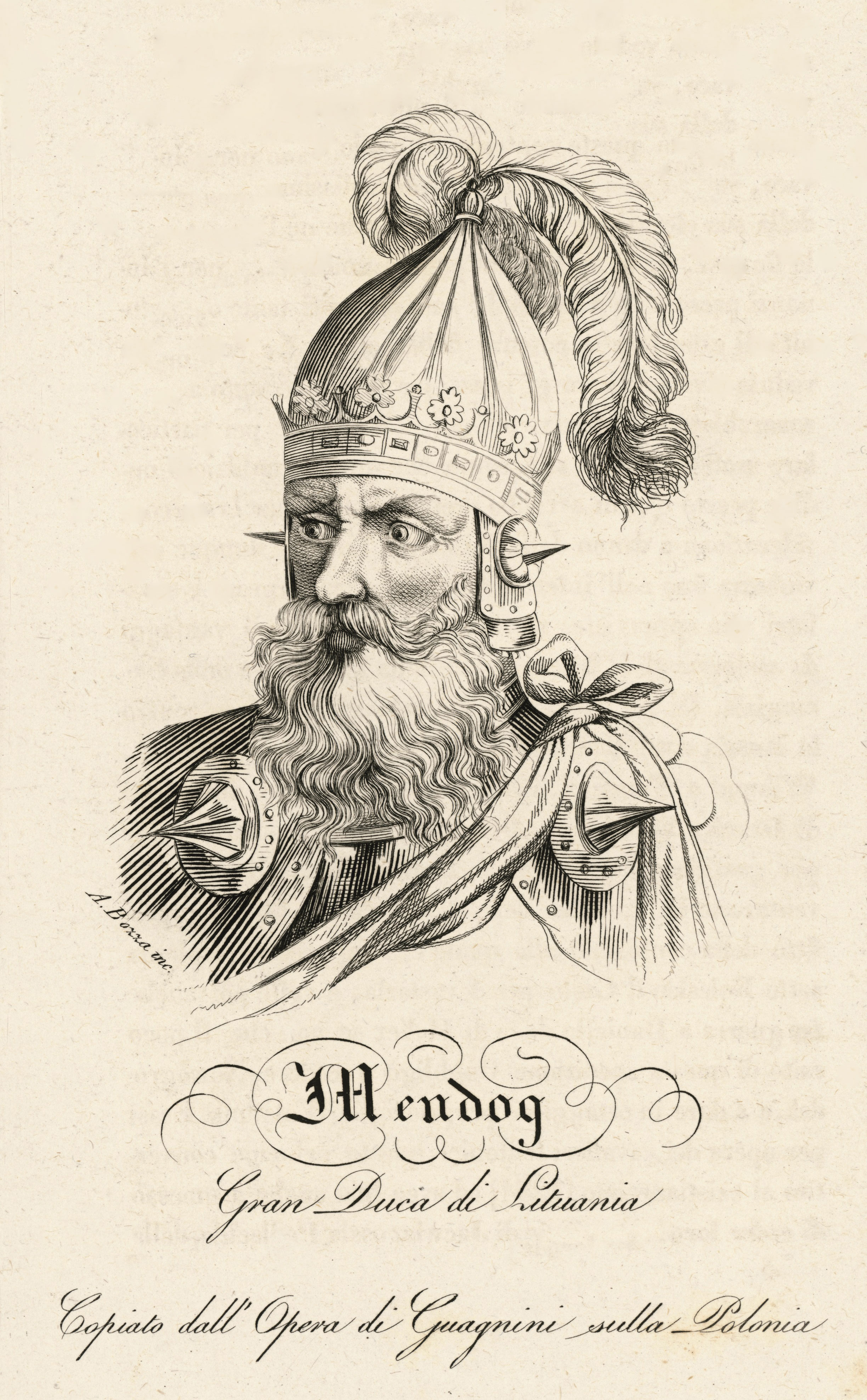 Беларуская (тарашкевіца): Уяўны партрэт караля і вялікага князя літоўскага Міндоўга (Mindoŭh)